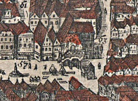 Vogelschau auf Wien von Norden. Zweite, unveränderte Ausgabe von 1640, basierend auf der ersten Ausgabe von 1609. Ausschnitt, den Hohen Markt zeigend.